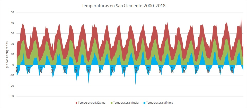 Gráfica de temperaturas de San Clemente (Cuenca)